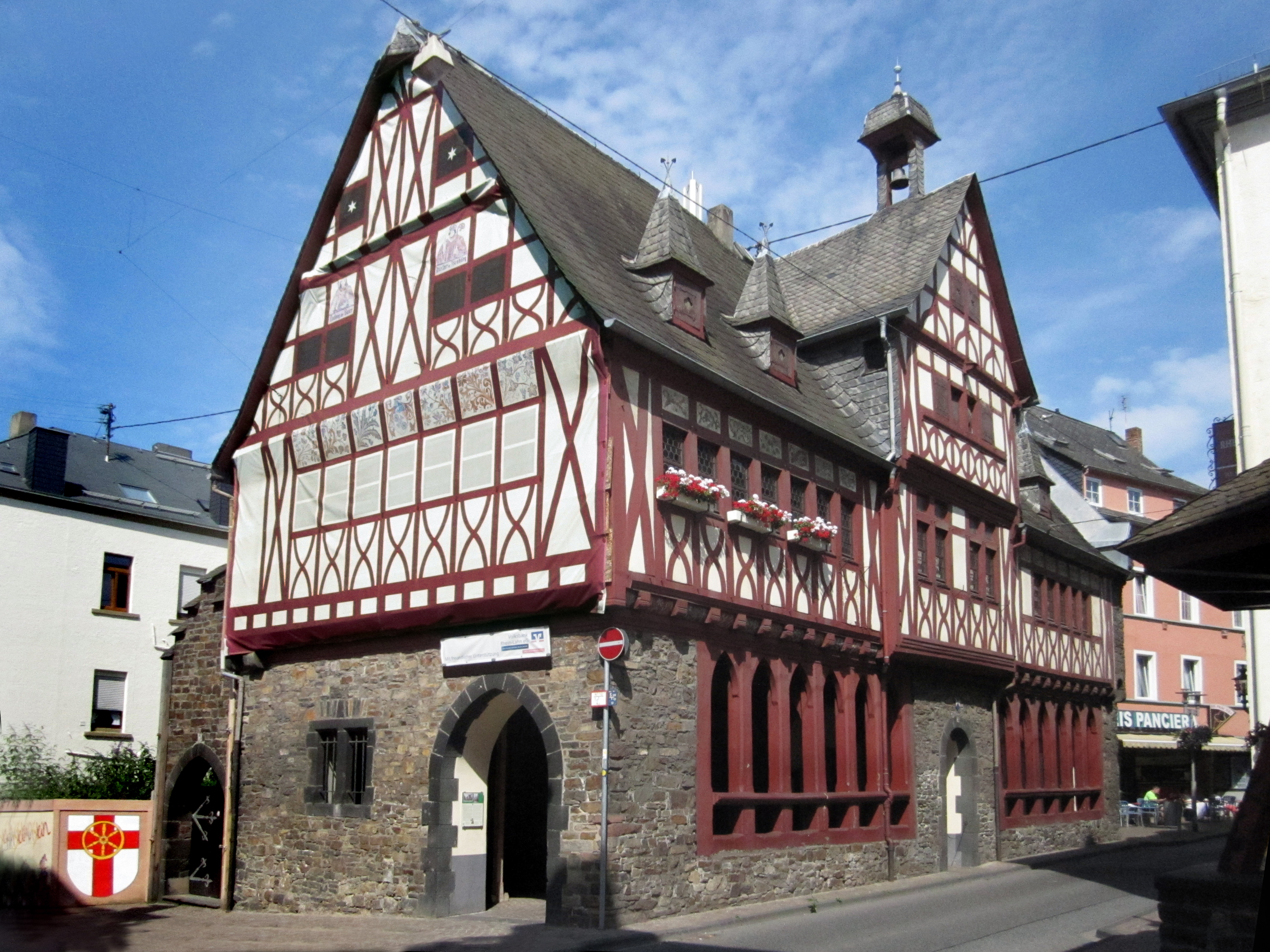 Oberlahnstein, Rathaus, Foto 2013